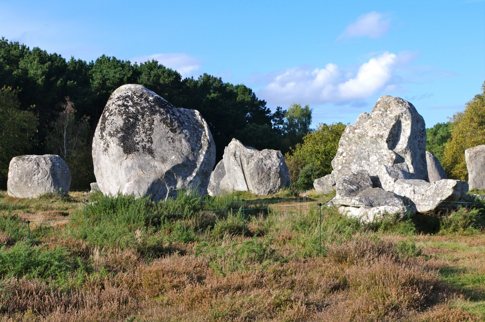 De gros menhir, alignement Kermarion, Carnac